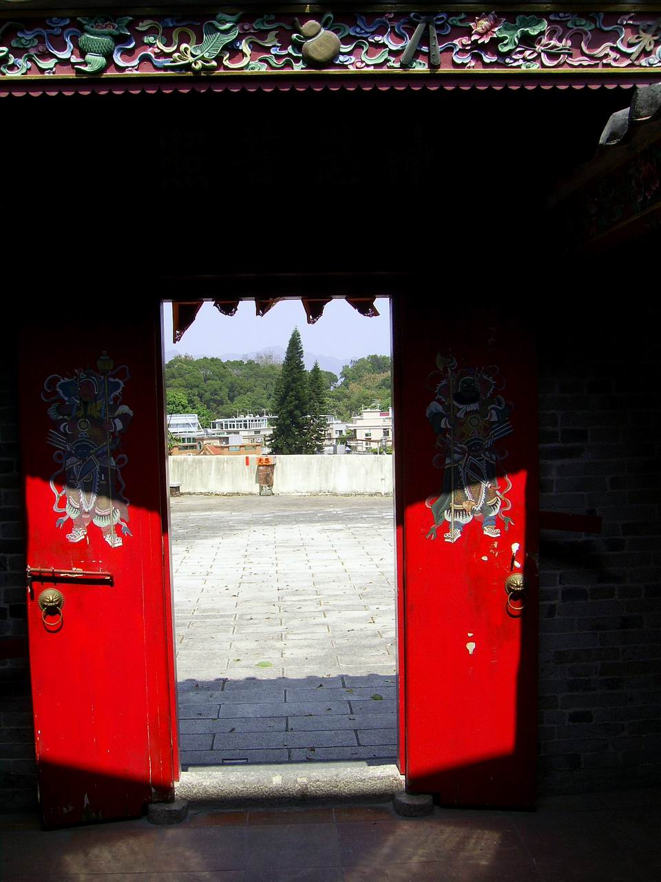 樊仙宮大門門神